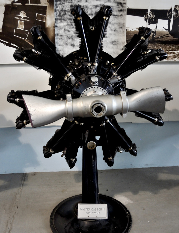 letecký motor Walter Castor III (1934)